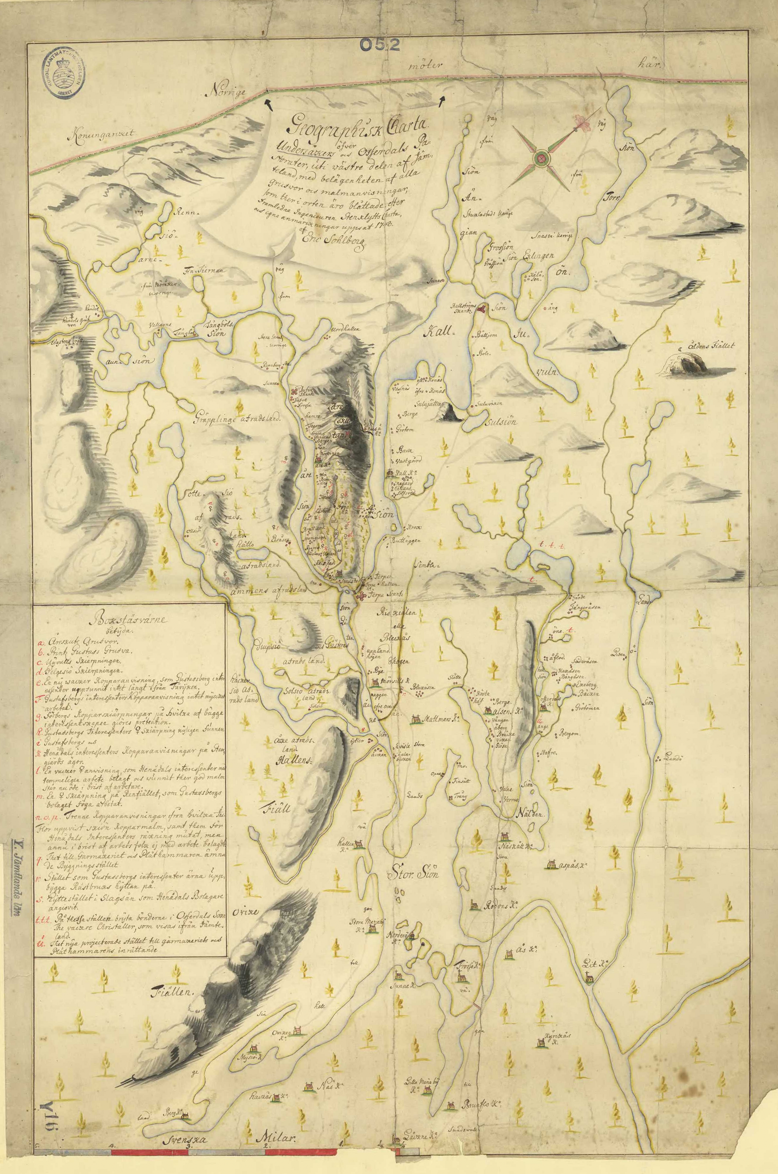 Karta över Undersåker och Offerdals socknar, eller över motsvarande västra Jämtland. Kartan följer indalsälven (och Åredalen) västerut från Storsjön.